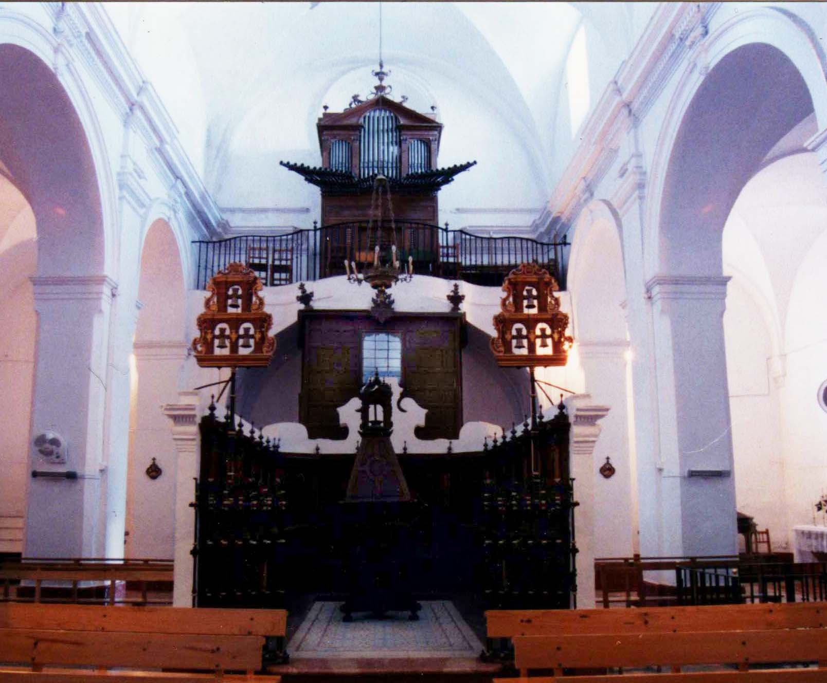 Interior de la Iglesia Santa María de la Mesa en Zahara de la Sierra, Cádiz